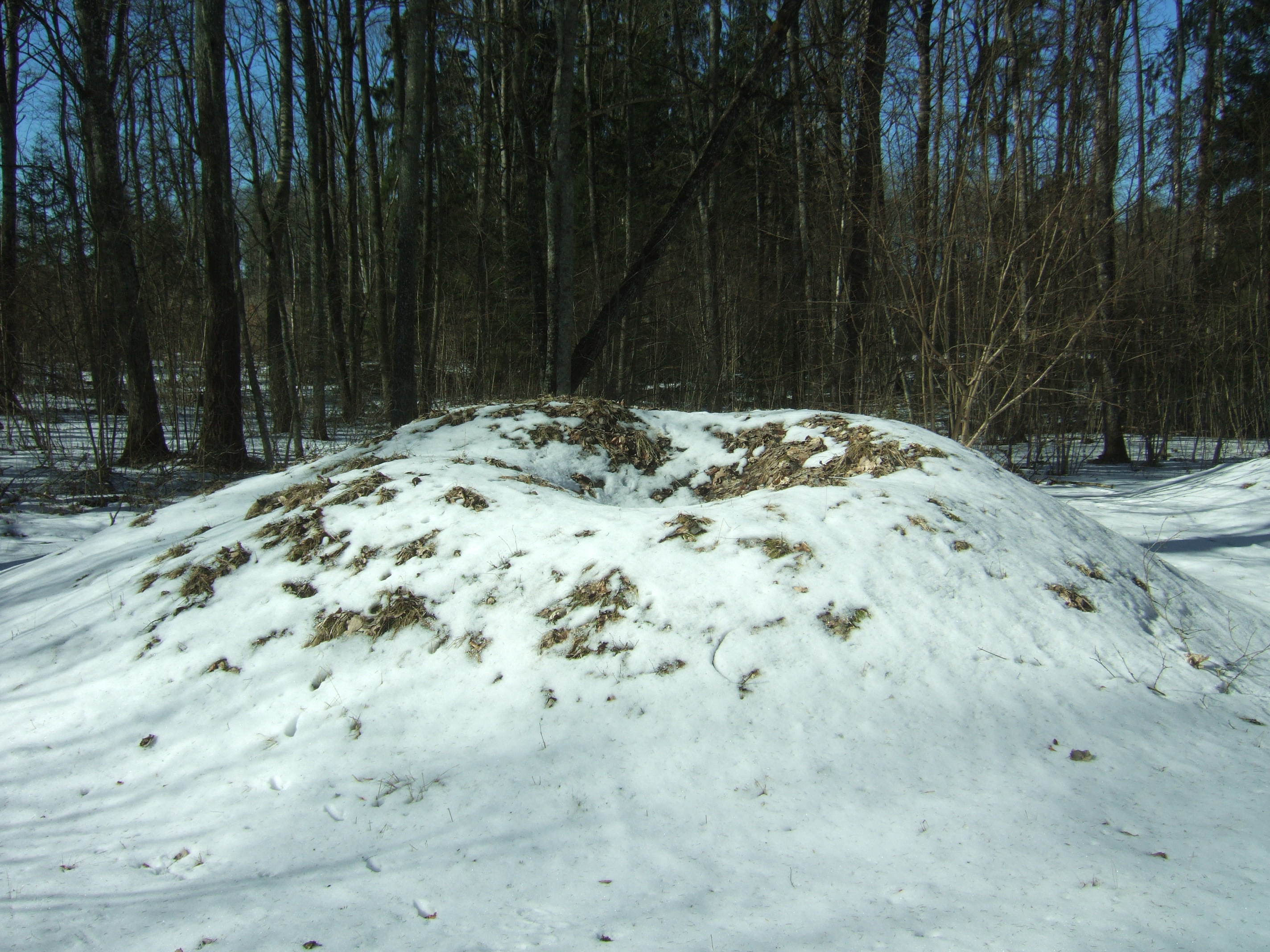 Stakų pilkapyno pilkapis